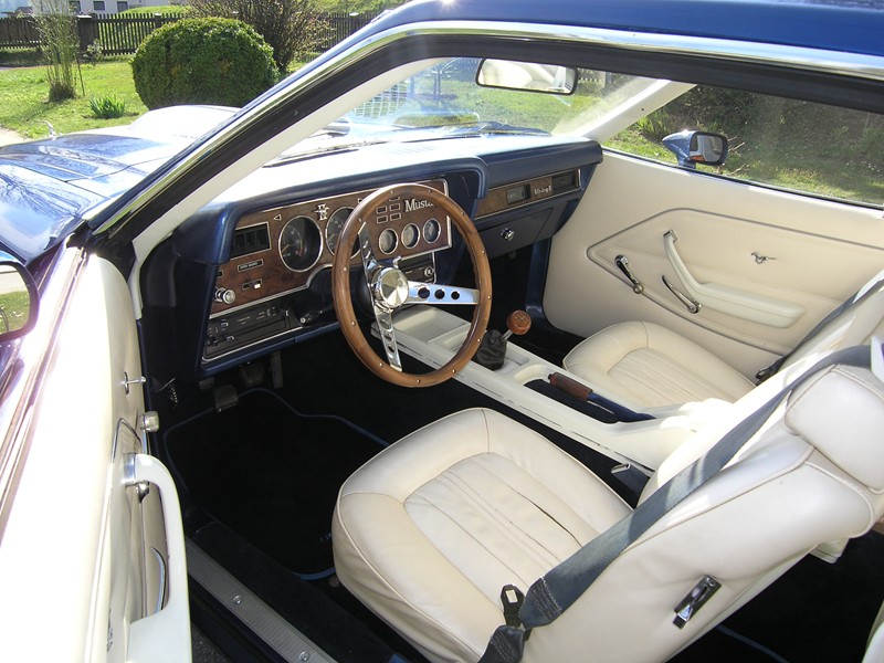 Mustang 74 Interior